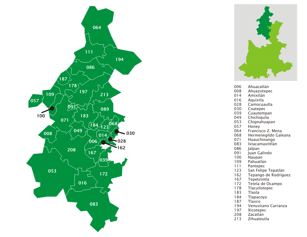 Mapa de los municipios de la región de Huauhchinango, Puebla, México